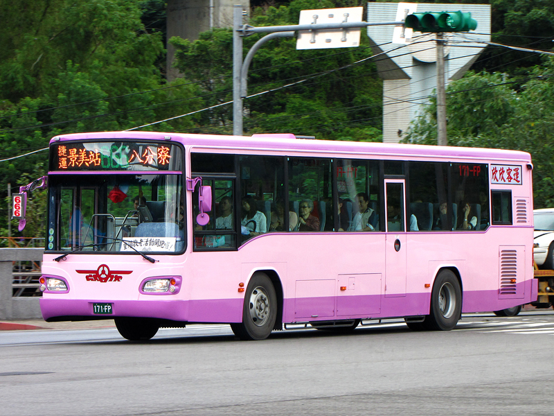 欣欣客運2009年HINO RK8JRSA大客車171-FP左前方外觀。